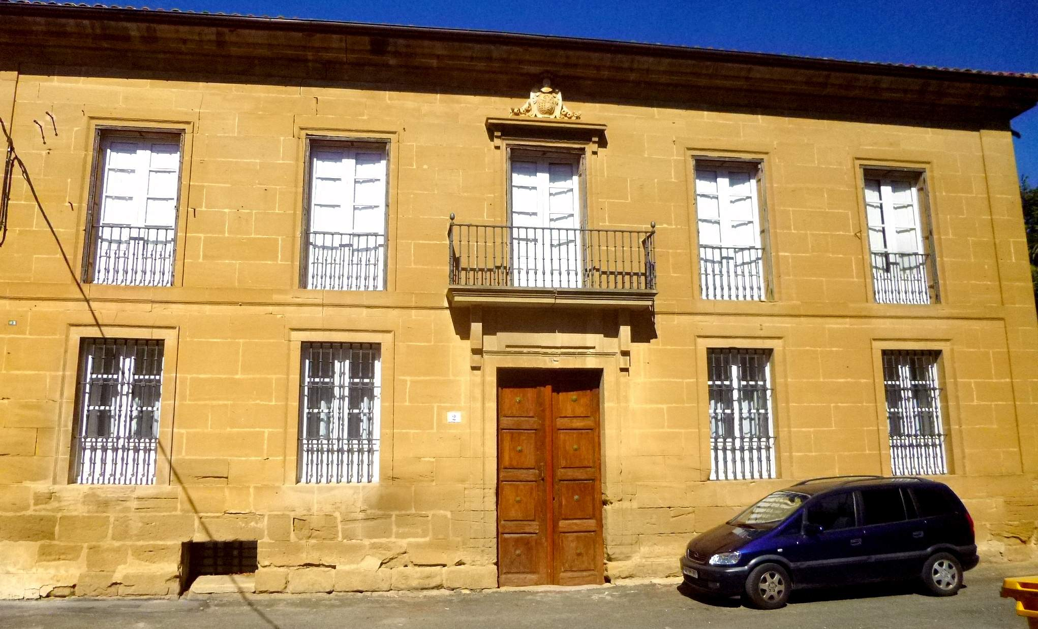 Palacio de Federico Paternina (Ollauri, La Rioja, España)